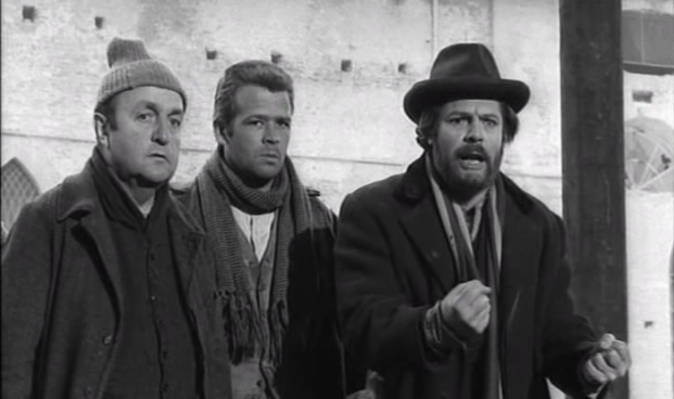 Screenshot del film I compagni (1963) di Mario Monicelli.